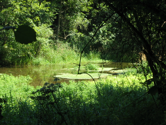 Vivier de Tancarville, Tancarville, Seine-Maritime, France